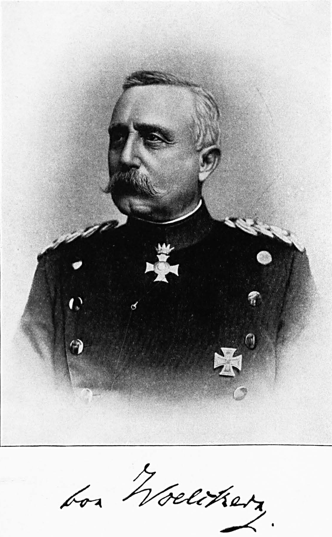 Wilhelm von Woelckern, Porträt.